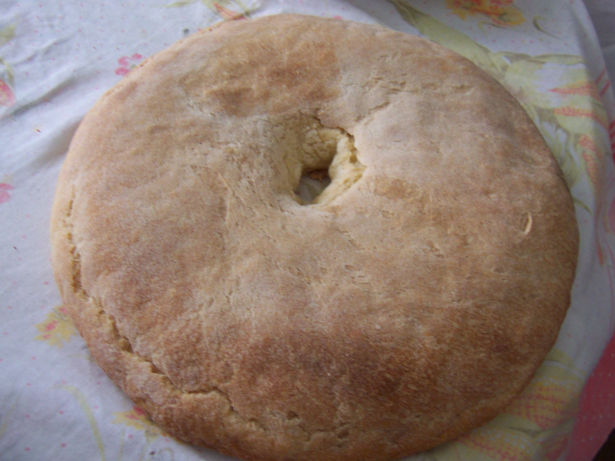 Pitta, Calabrian cook